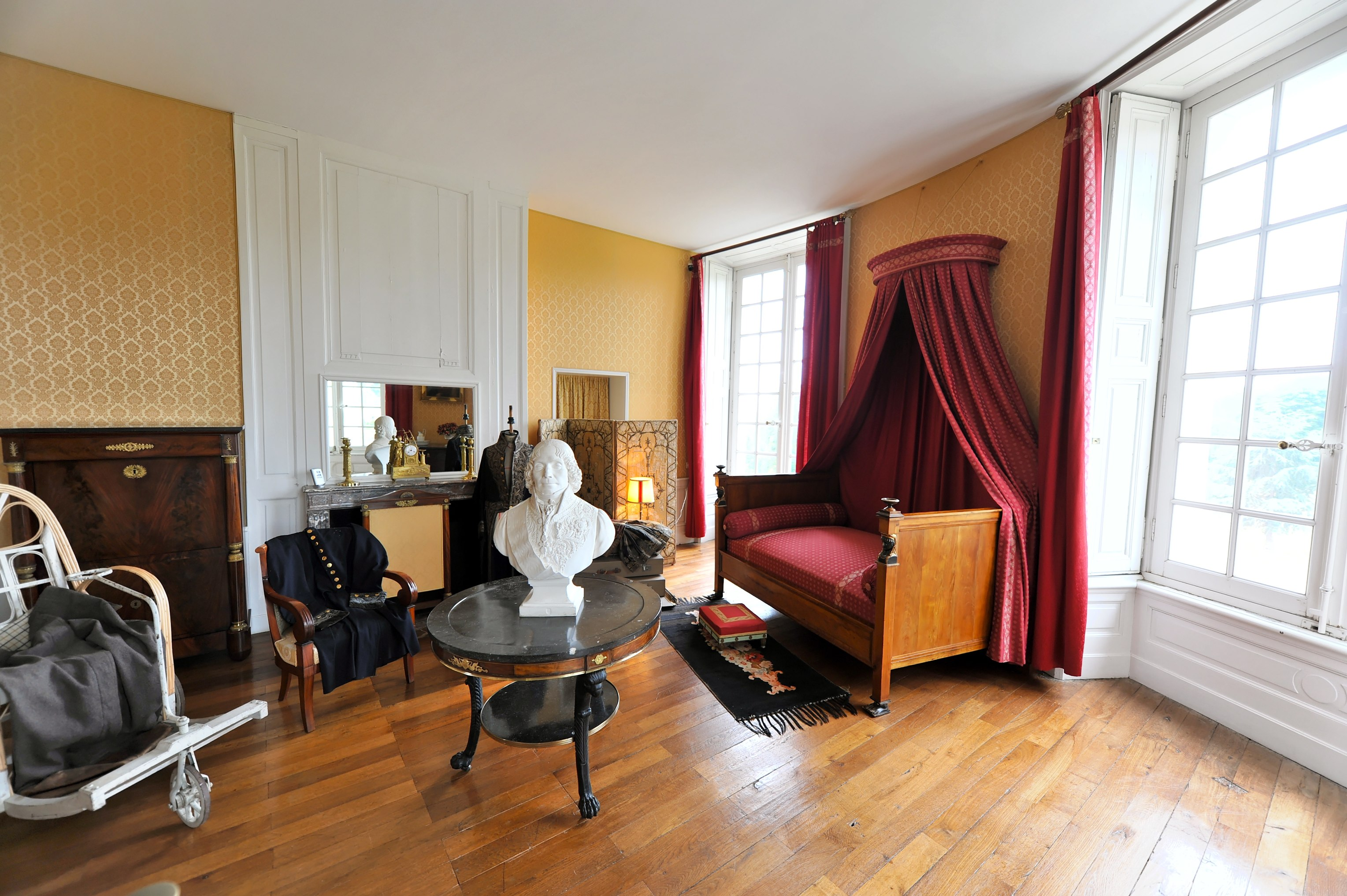 Château de Valençay, la chambre de Talleyrand